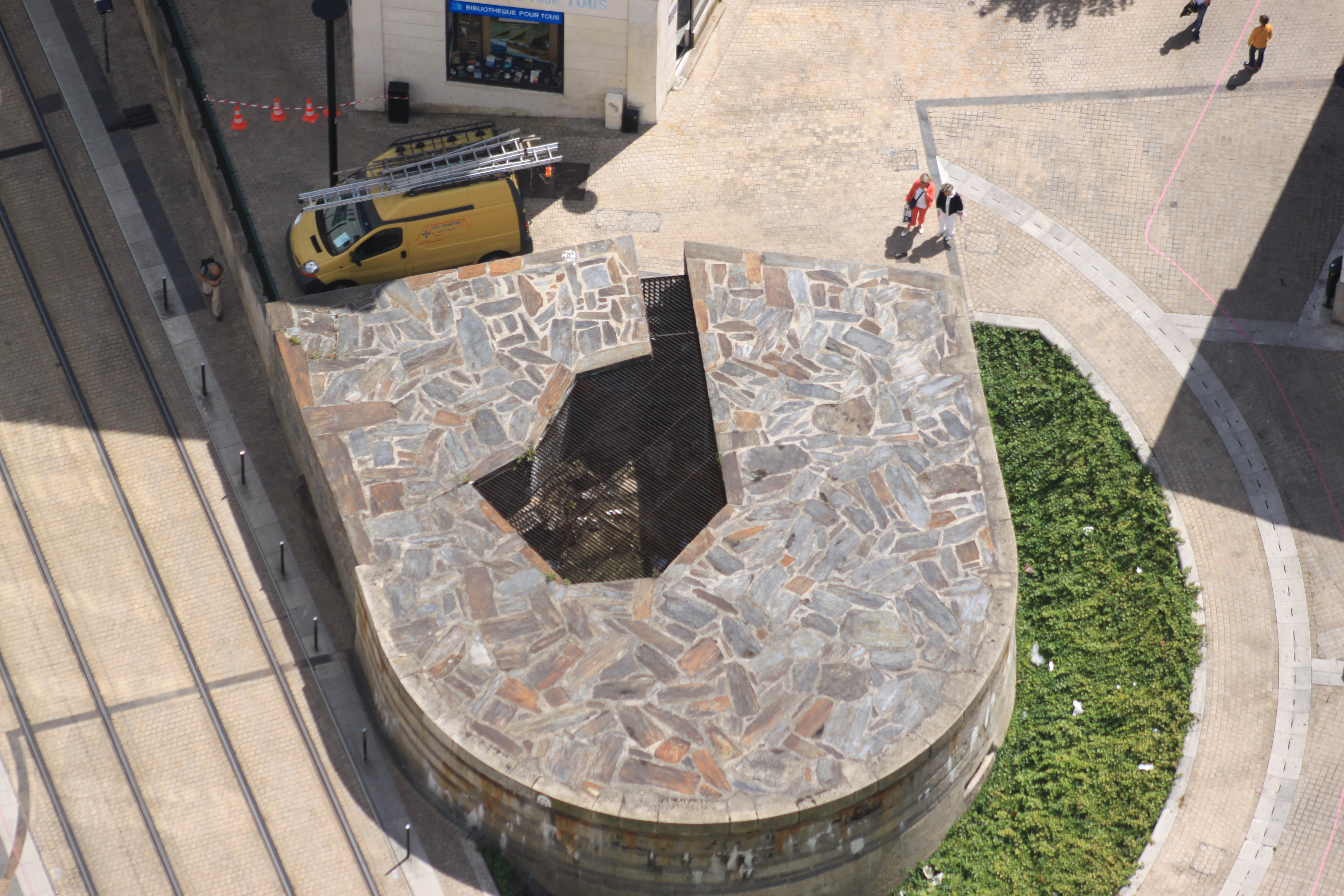 Tour Haut-le-Pied de la porte Sauvetout, rue du Pont-Sauvetout, Fr-44-Nantes.